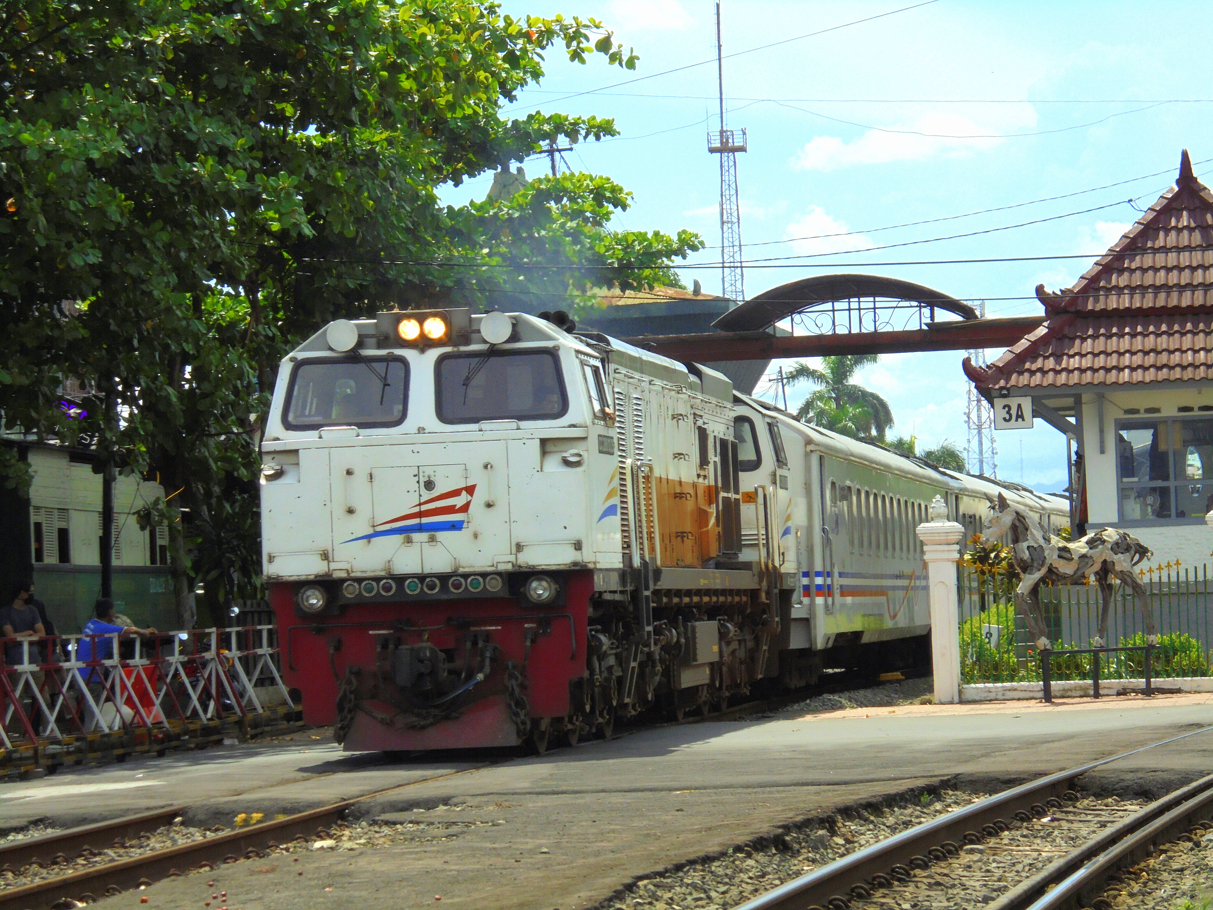 Kereta api Anjasmoro saat meninggalkan Stasiun Yogyakarta